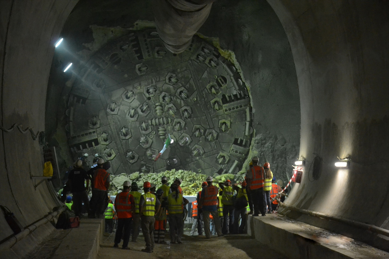 מנהרה 3 בקו הרכבת המהיר לירושלים רגעים אחרי סיום הכריה